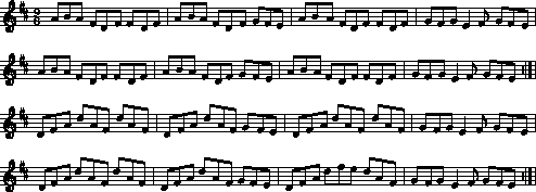 Notenbeispiel für einen Slip Jig